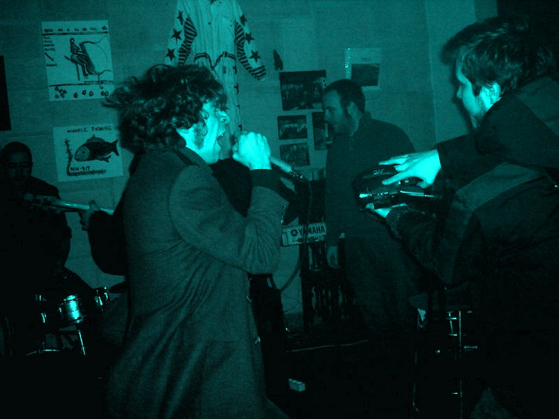 Umjetnička fotografija.Autor: Viktor Alimanović.